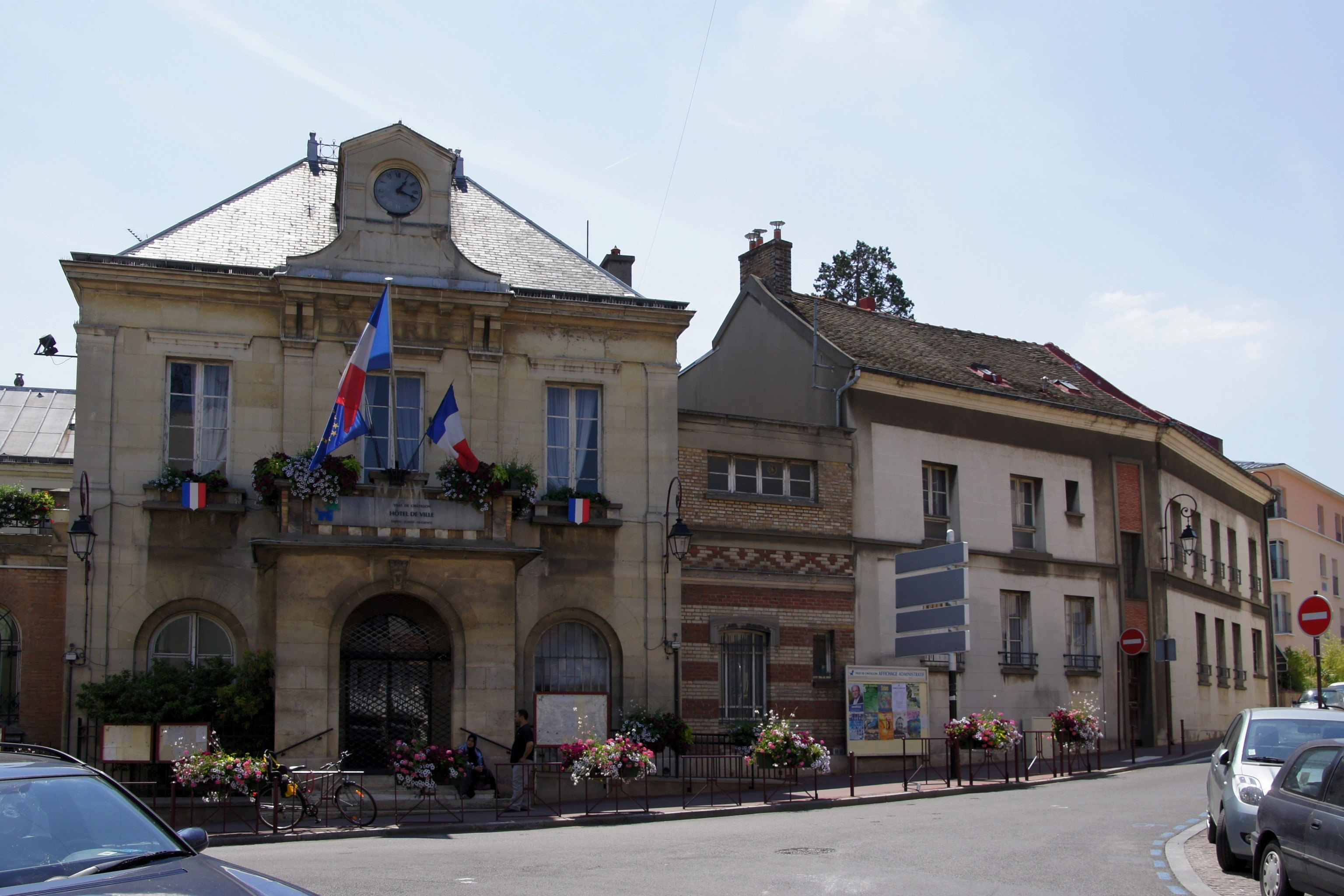 Mairie de Chatillon (92)